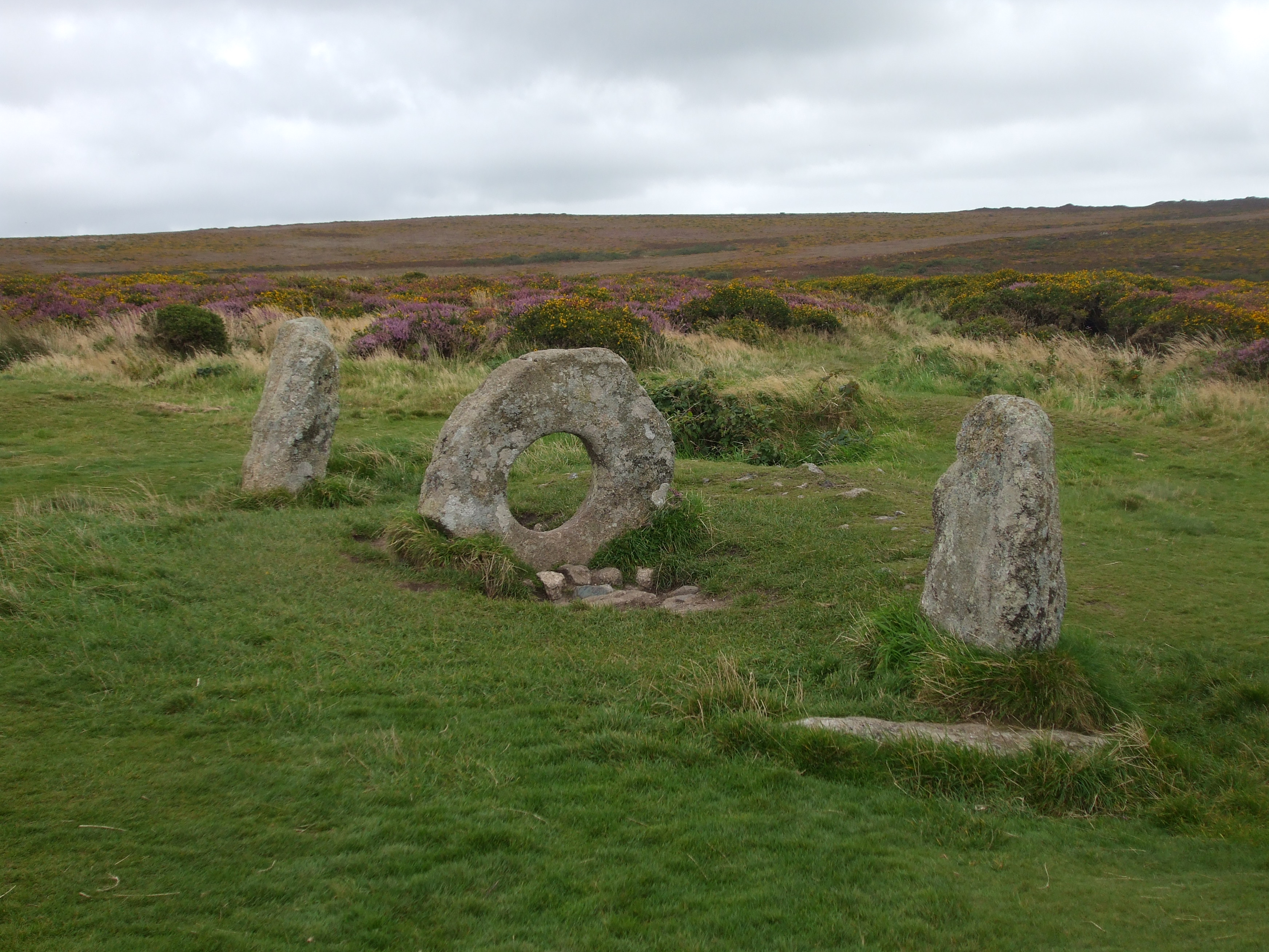 Sito megalitico di men-an-tol, Cornovaglia